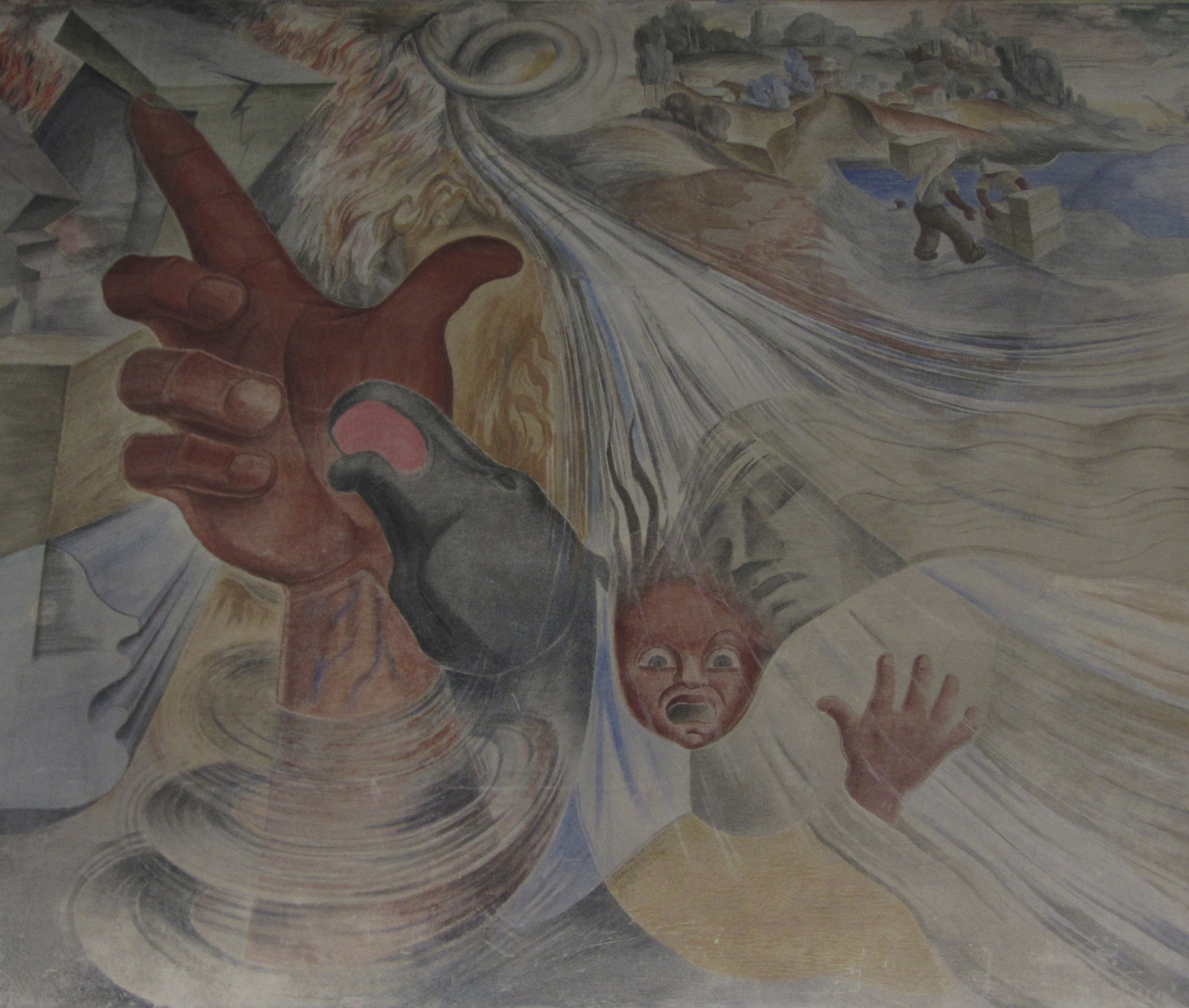 Mural "Hostoria de Concepción" (1943-1946) de Gregorio de la Fuente Barrio Cívico de Concepción, Chile Detalle de los desastres naturales Foto: Sepiembre de 2012. This is a photo of a national monument in Chile: 2150